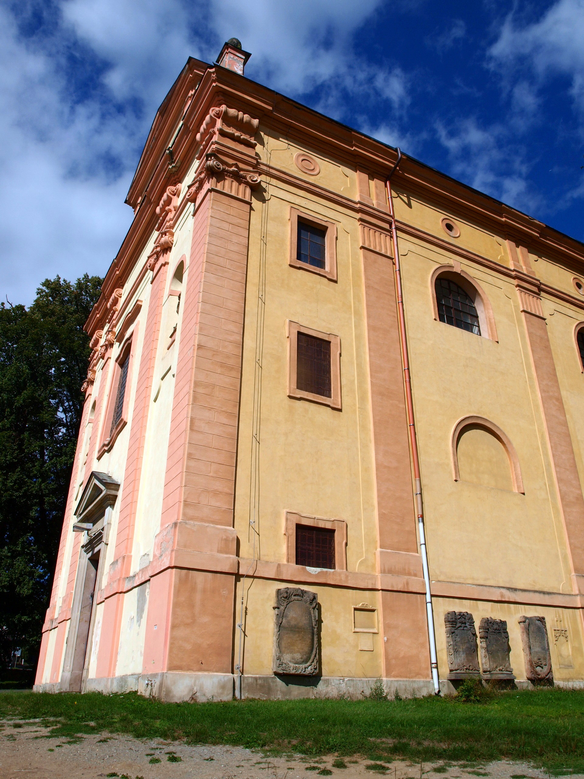 Česká Lípa